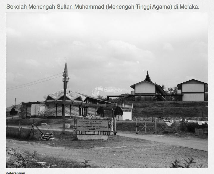 Sekolah di awal penubuhan Sekolah Menengah Sultan Muhammad